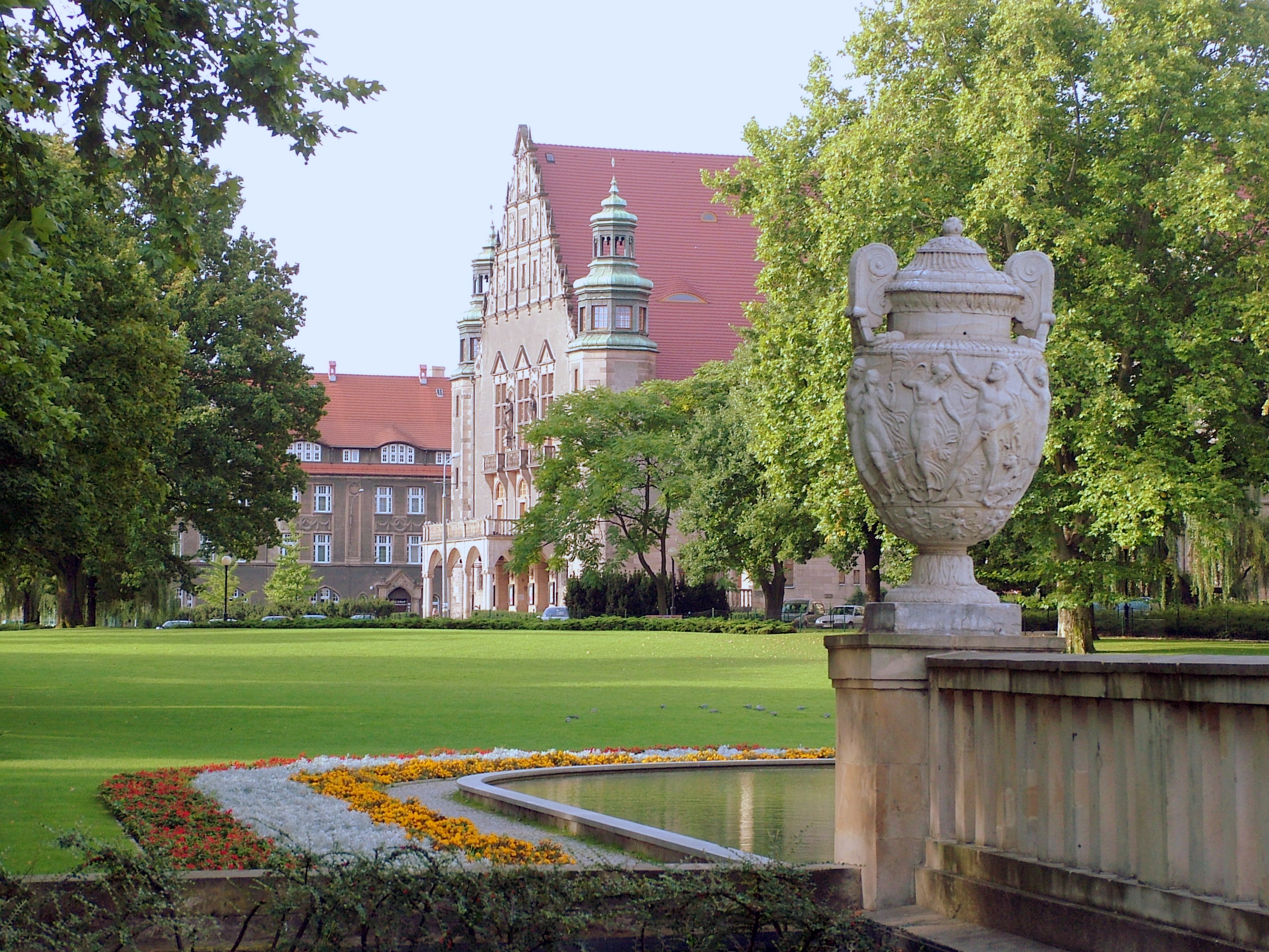 Universität mit Park